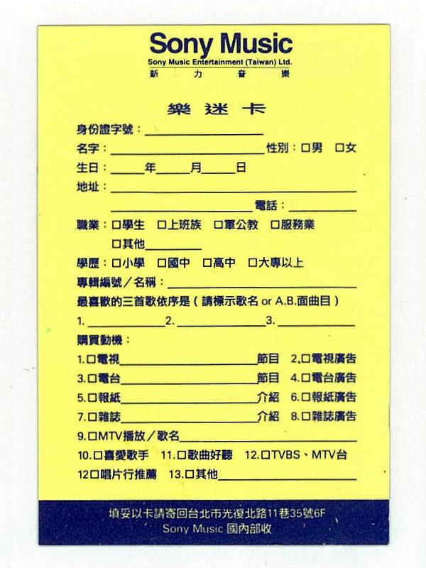 中文（台灣）: 1996年台灣新力音樂國內部樂迷卡，以厚紙卡印製。